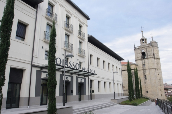 Oiasso Museoko sarrera